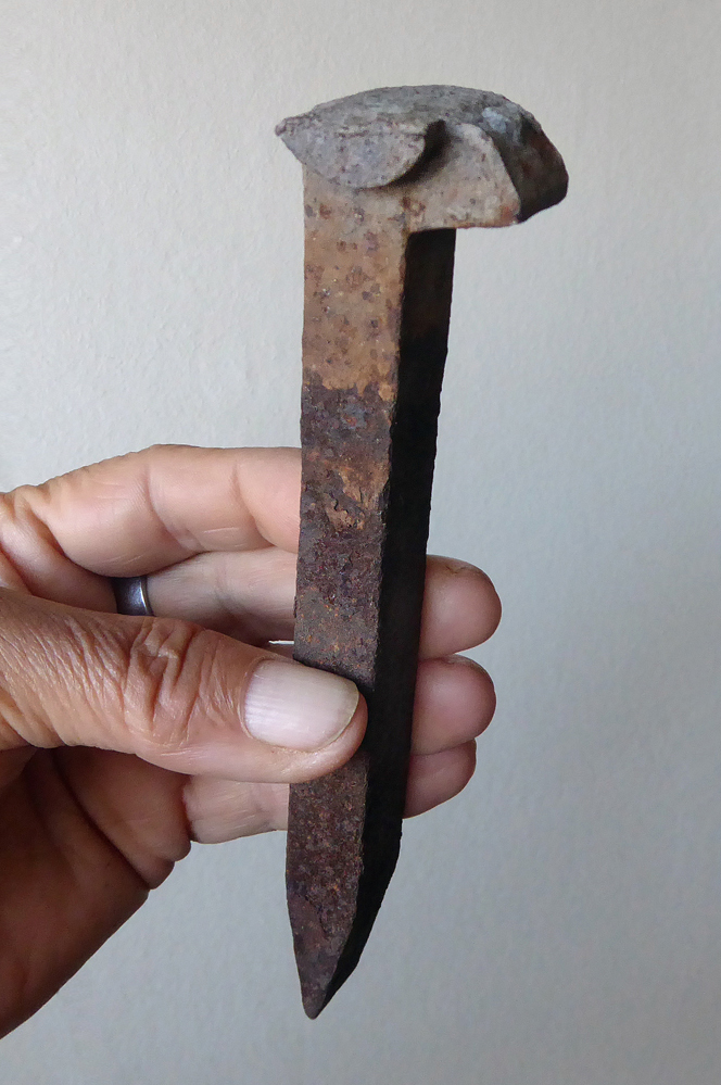 Rälsspik.